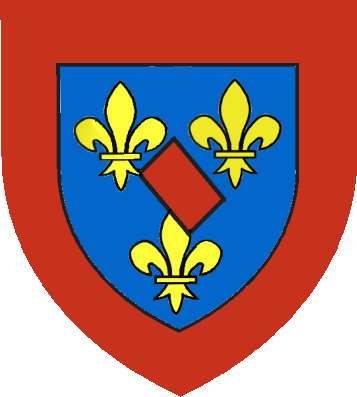 Armoiries des princes de Conti